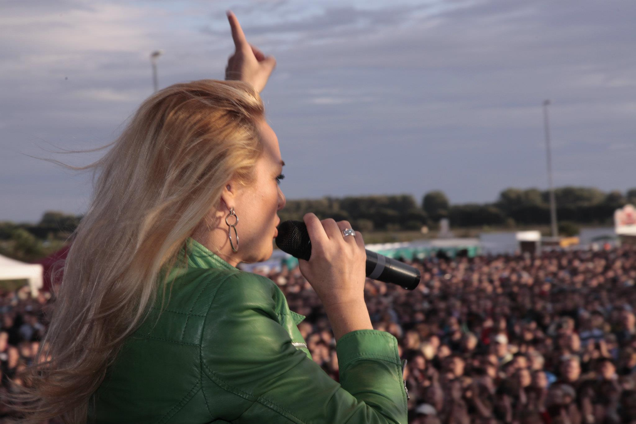 Moderatorin Billy Wulff präsentiert Sarah Connor, Milow und Reamon bei der VR Star Arena 2009